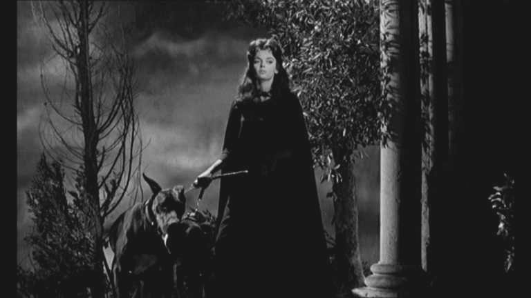 Screenshot del film La maschera del demonio di Mario Bava